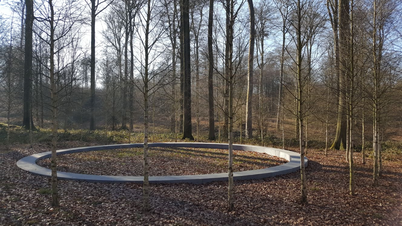 Herdenkingsmonument in Zoniënwoud na de aanslagen vaan 22 maart 2016 in Brussel.